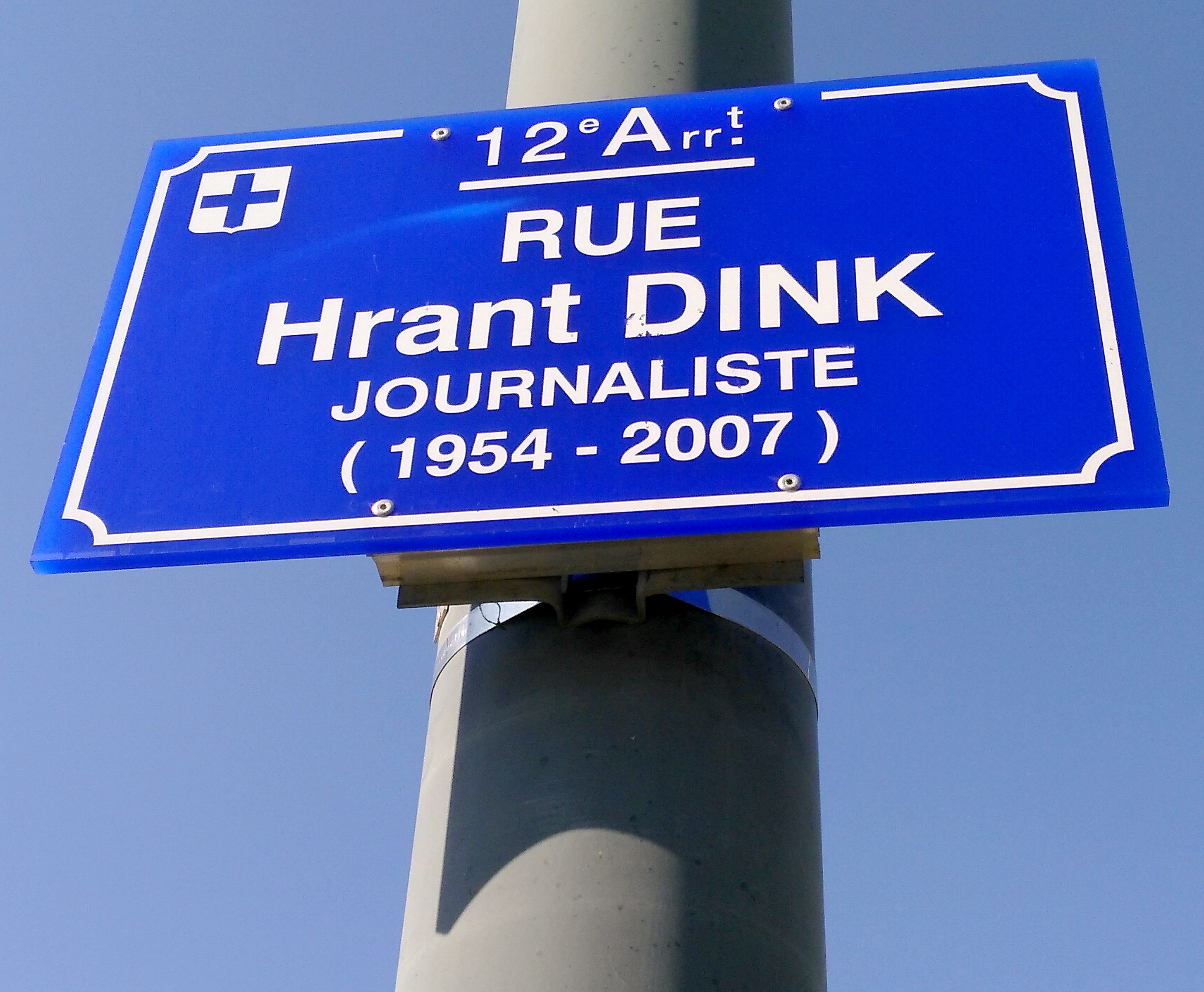 Plaque de la rue Hrant Dink, Marseille, à l'angle des rues Hrant Dink et Saint-Pierre